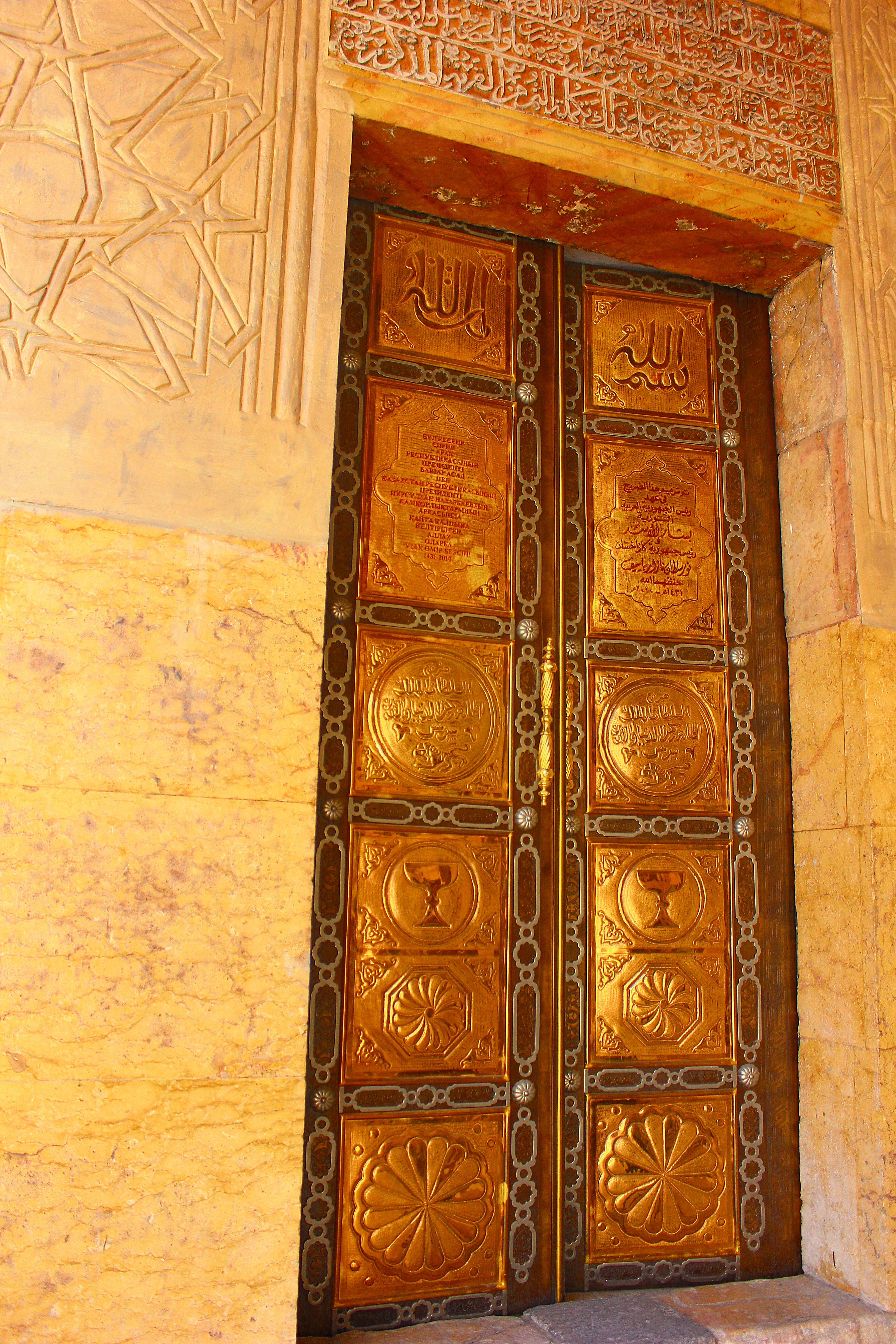 Damascus